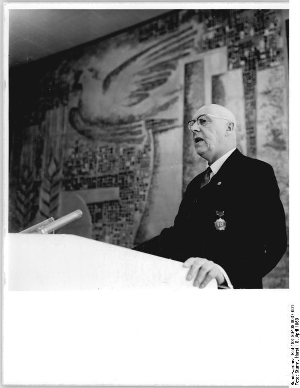 Zentralbild Sturm 8.4.1968 bgm-pri Berlin: Neue Verfassung der DDR - Feierlicher Staatsakt im Amtssitz des Staatsrates am 8.4.1968. In einem festlichen Staatsakt im Amtssitz des Staatsrates der DDR nahm der Vorsitzende des Staatsrates der DDR, Walter Ulbricht, in Anwesenheit führender Persönlichkeiten den Bericht der Zentralen Abstimmungskommission über das Ergebnis des Volksentscheides entgegen und verkündete feierlich die durch das Volk am 6. April beschlossene Verfassung der DDR. UBz: Der Vorsitzende der Zentralen Abstimmungskommission, Dr. Heinrich Homann, bei seinem Bericht.